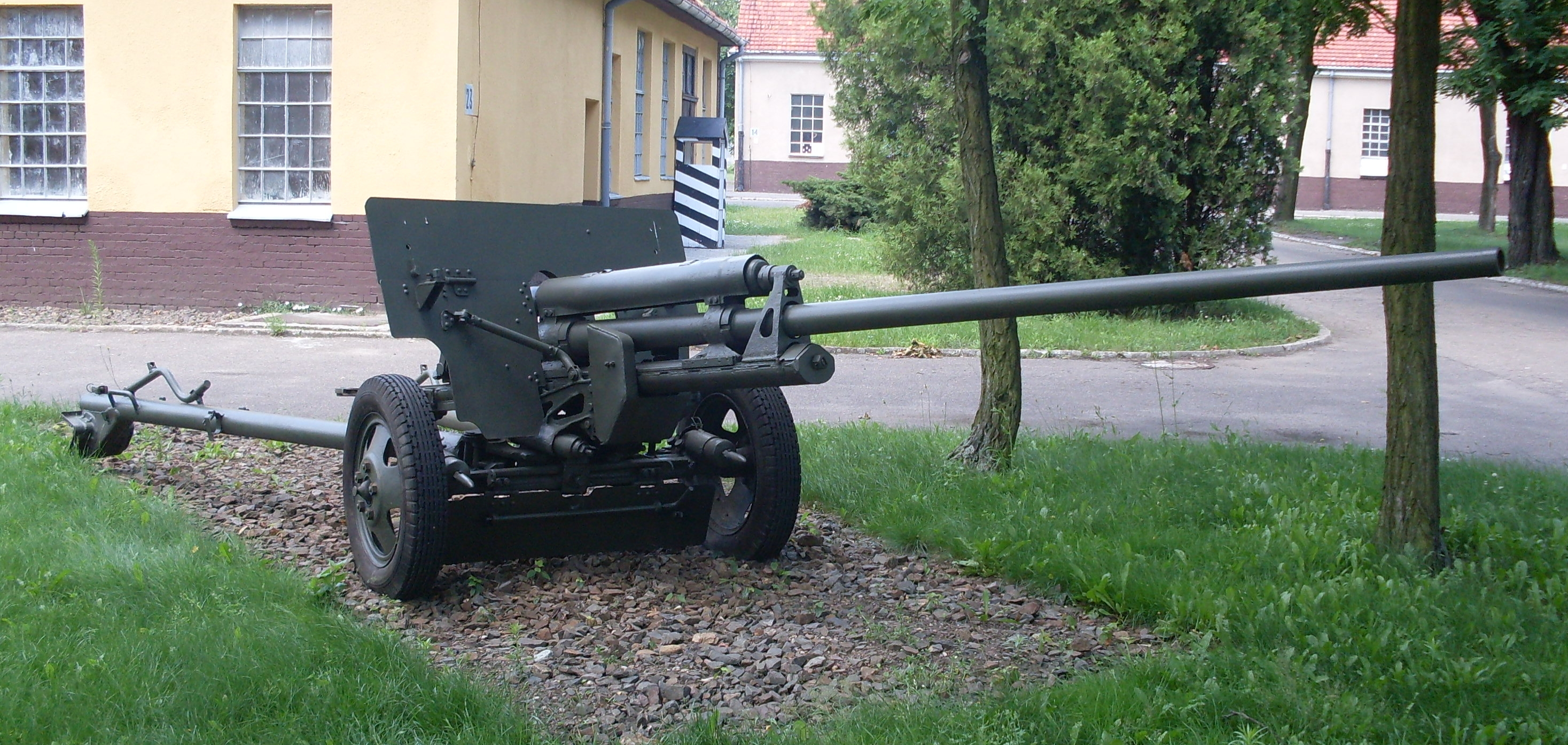 armata ppanc ZiS 2 w CSWLąd w Poznaniu